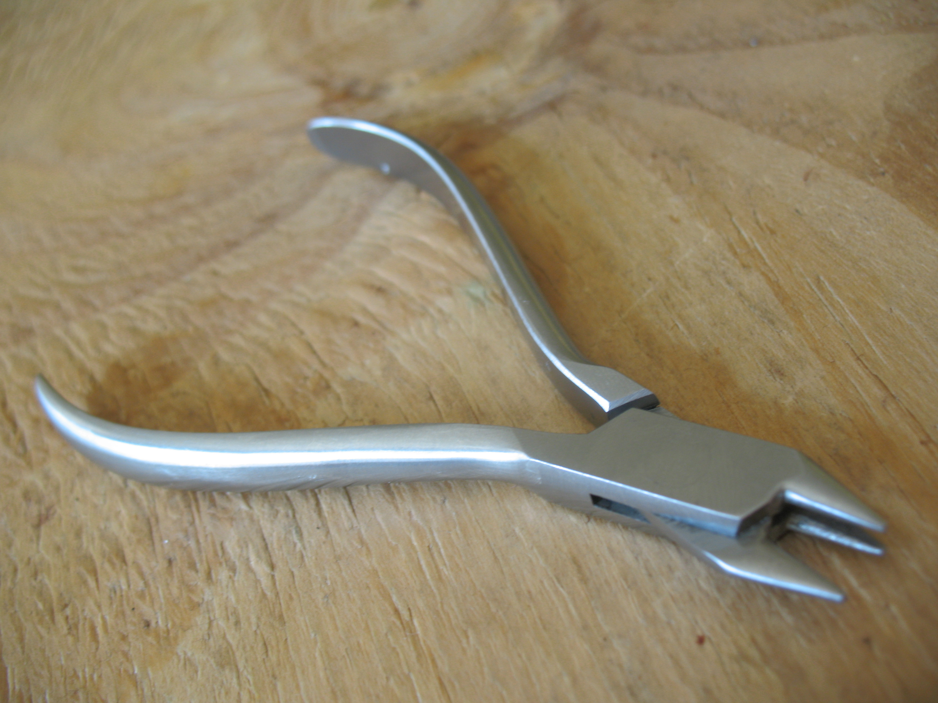 dreipunktzange für zahntechnik